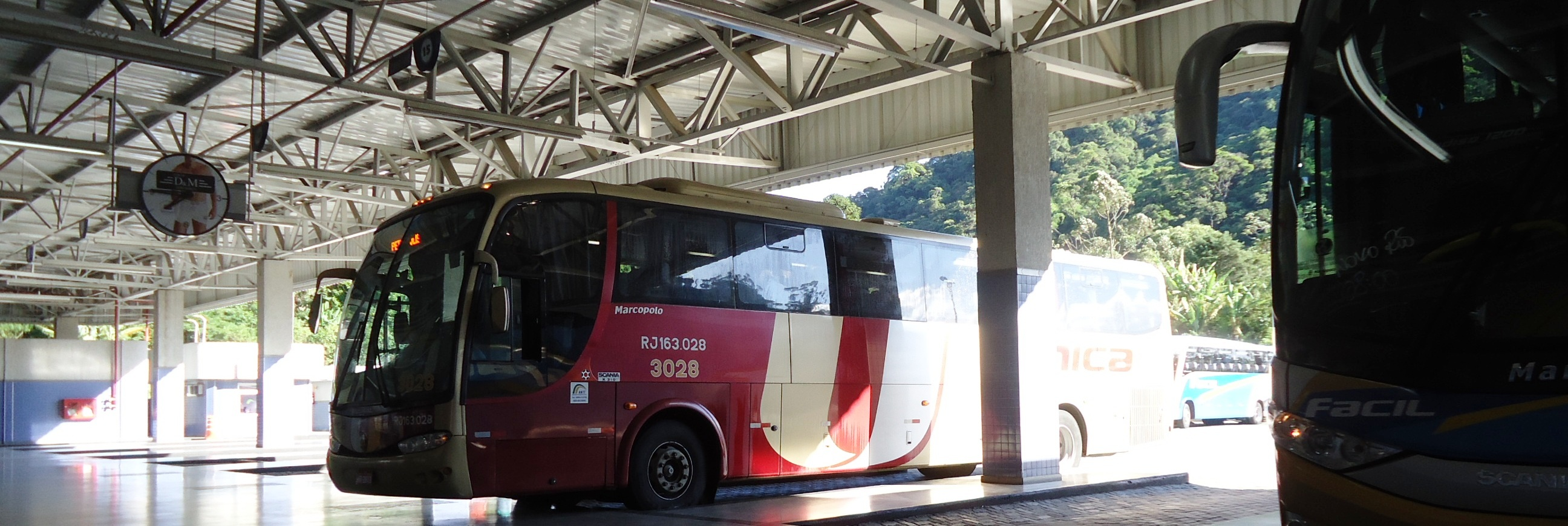 Ônibus da Transportes Única Petrópolis e da Fácil Transportes e Turismo.